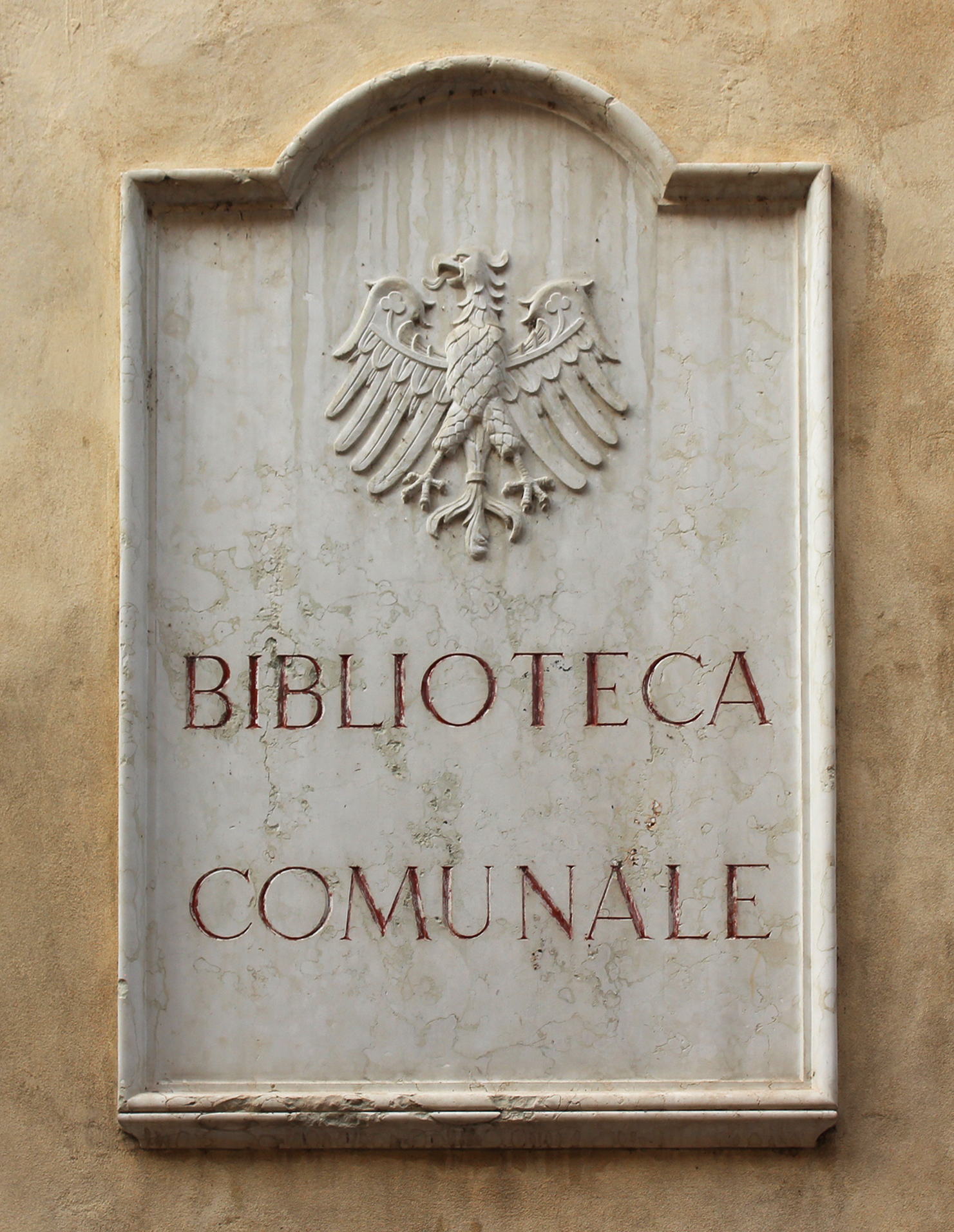 Biblioteca comunale di Trento This is a photo of a monument which is part of cultural heritage of Italy.